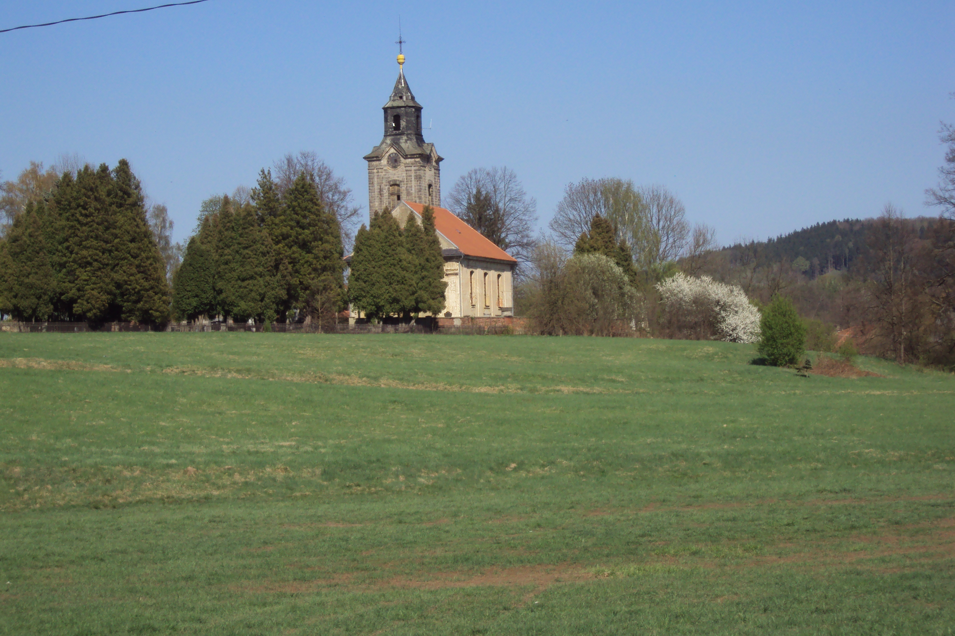 Lindavský kostel zdáli